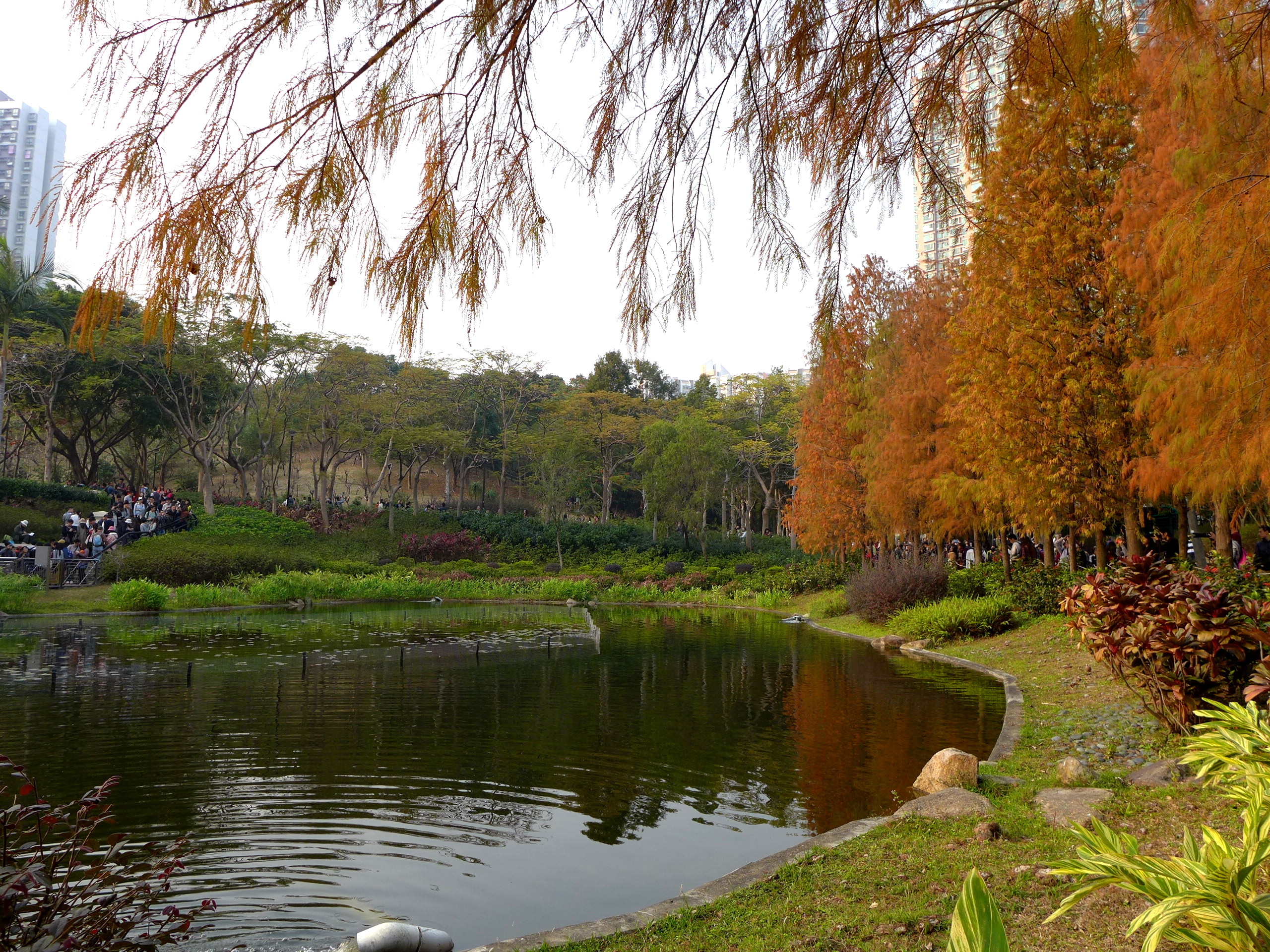 Tsing Yi Park Lake red leaves